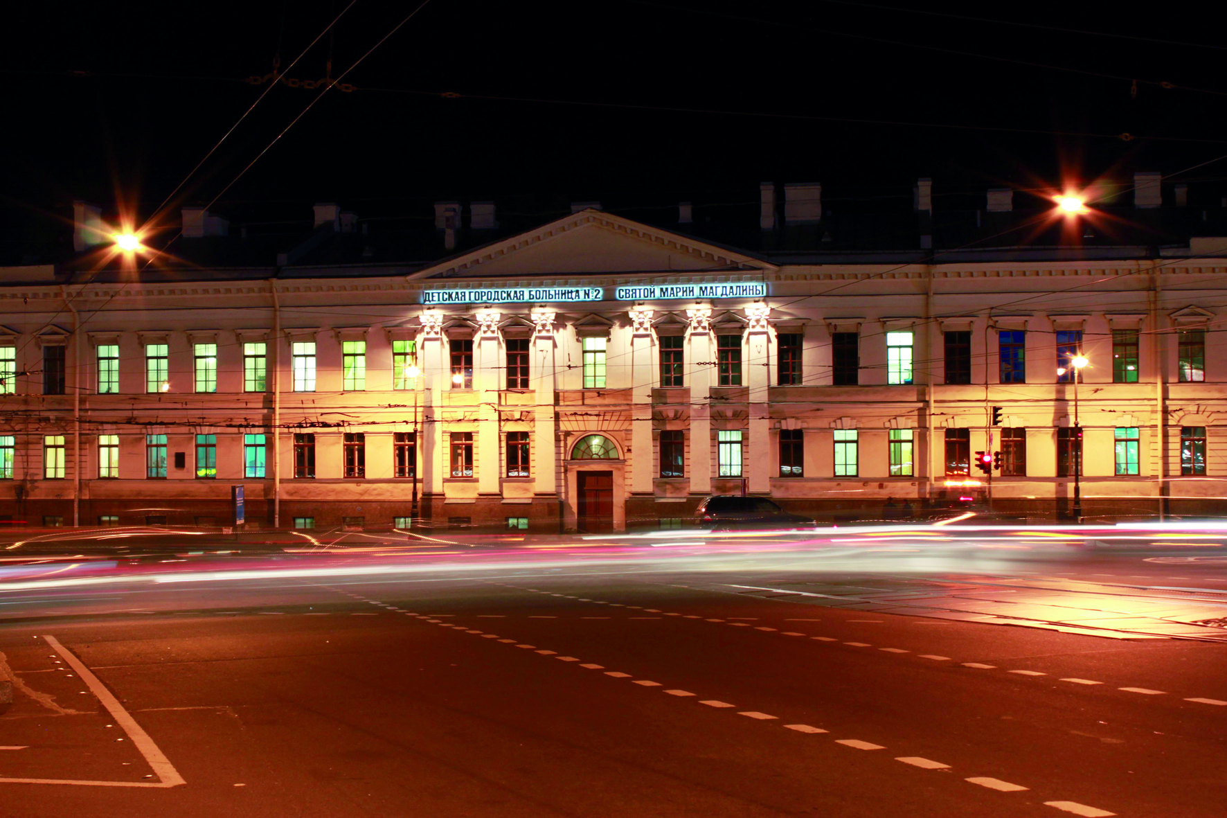 Детская больница святой Мариии Магдалины